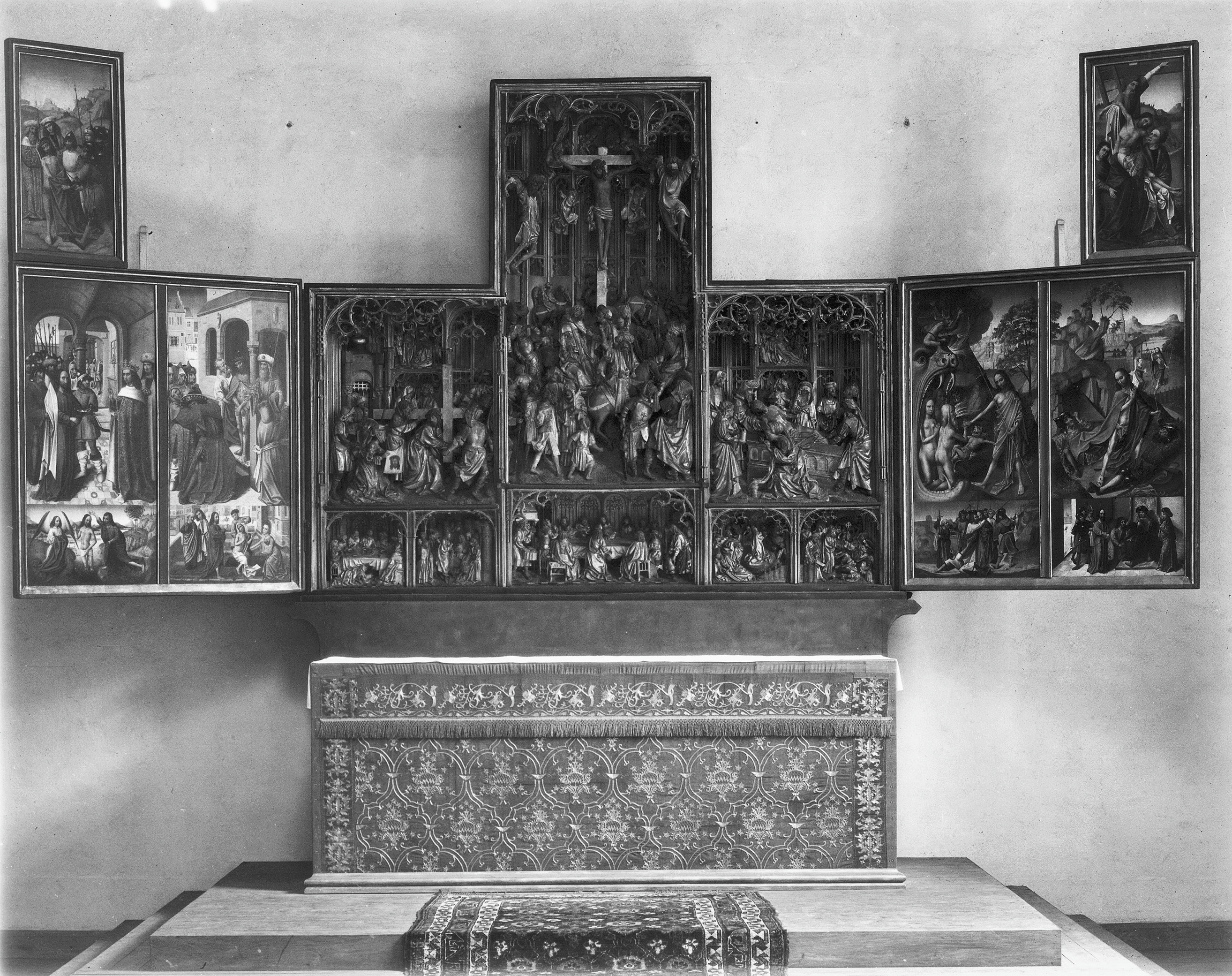 Rooms-Katholieke Kerk: details interieur